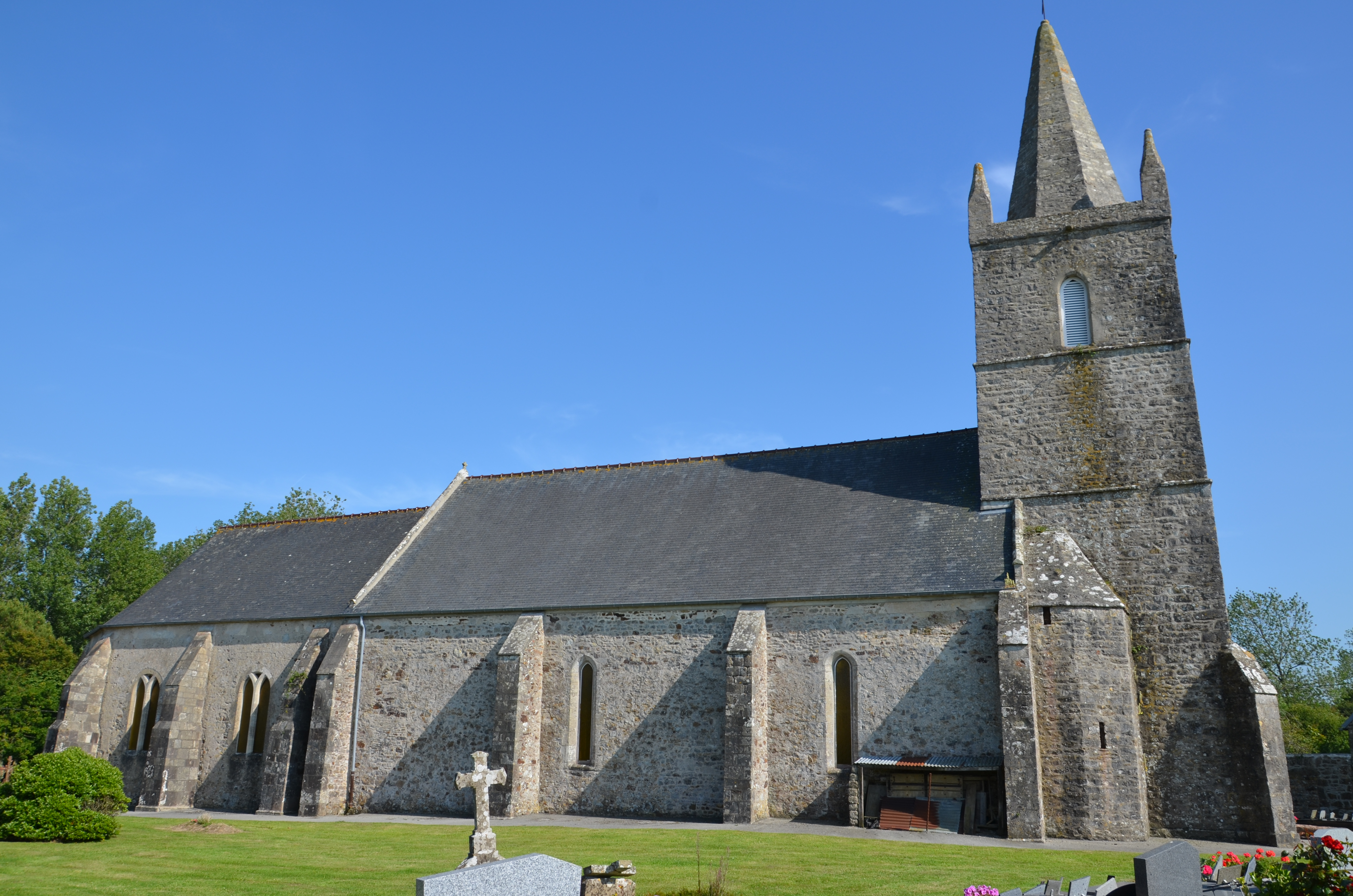 Église Saint-Lô de Sénoville.